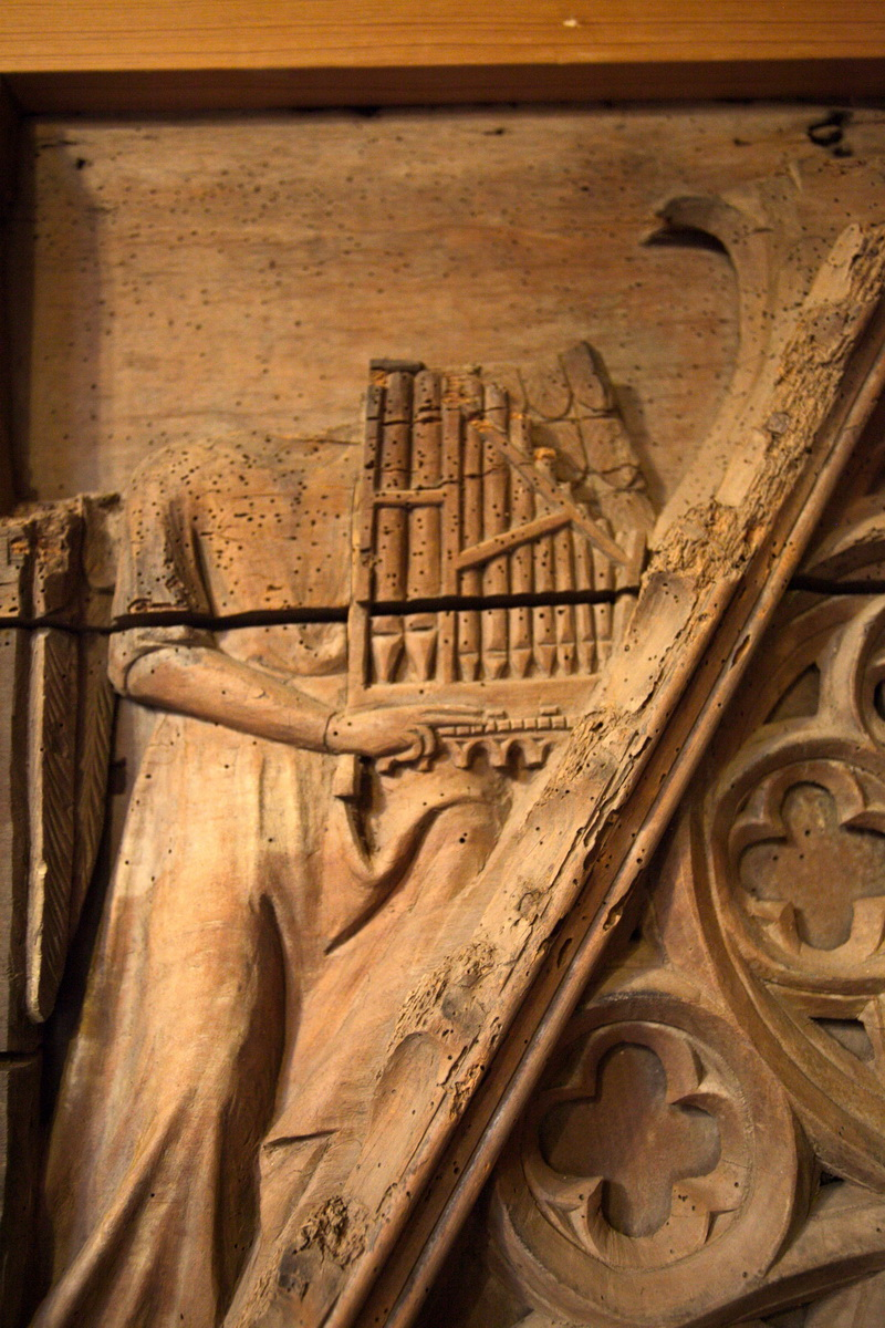 Escultura d'un àngel amb un orgue portàtil. Antic cor de la catedral de Girona. Actualment a la Fundació Maurí de la Garriga